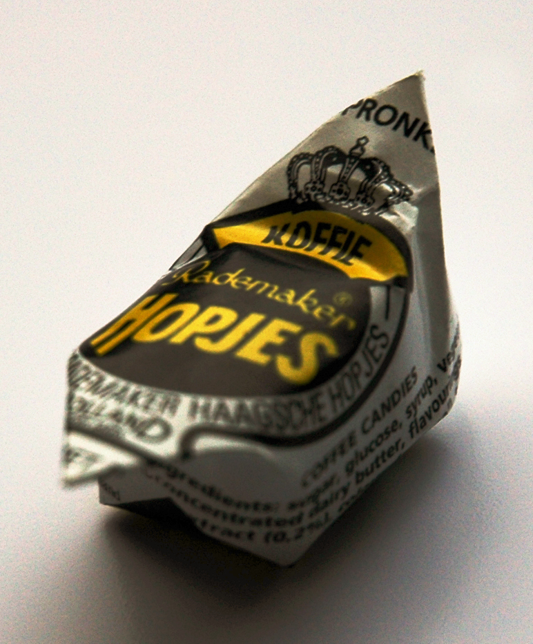 Een hopje